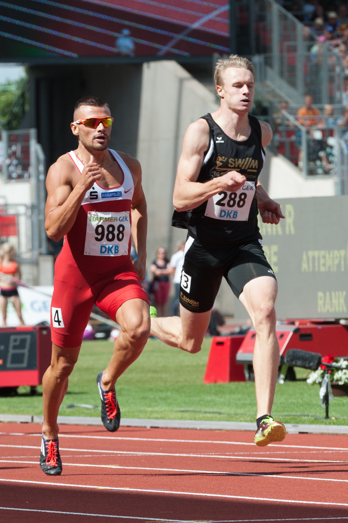 Deutsche Leichtathletik-Meisterschaften 2015: Männer 400m - Eric Krüger, Johannes Trefz